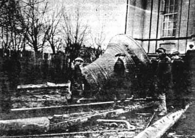 Снятие 1000-пудового (16-тонного) колокола с Большого Златоуста